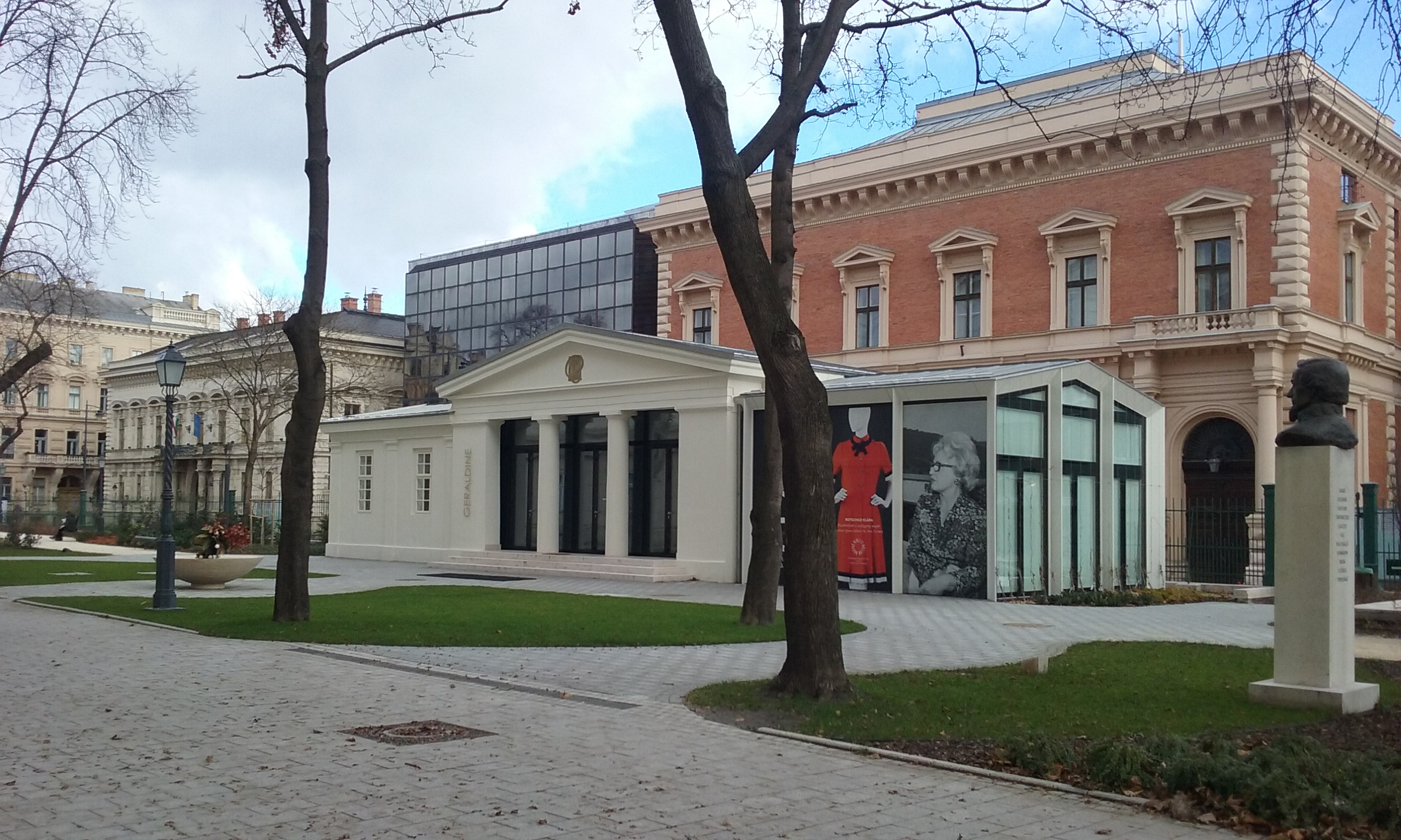 Múzeumkert, kertészház, a 2018-as felújítását követően. Wagner János tervezte 1852-ben, bővítés a 20. században (Budapest)